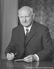 Porträt Konrad Ameln